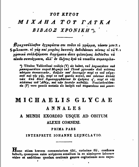 Сочинение Михаила Глика "Хронография" (Template:Lang-el) в Corpus Scriptorum Historiae Byzantinae 1836 год